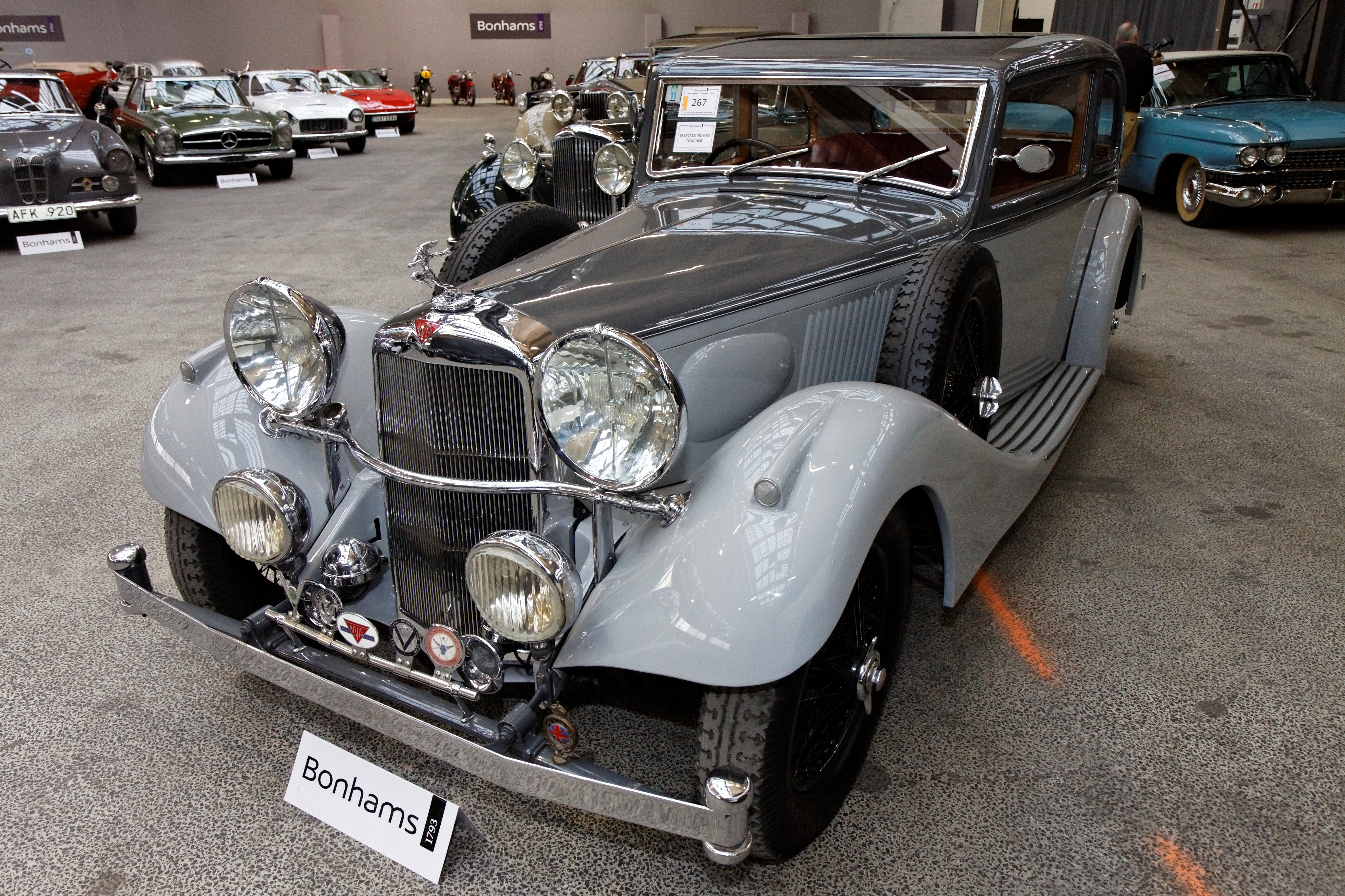 Alvis 4.3-Litre 'Long Bonnet' Sports Saloon